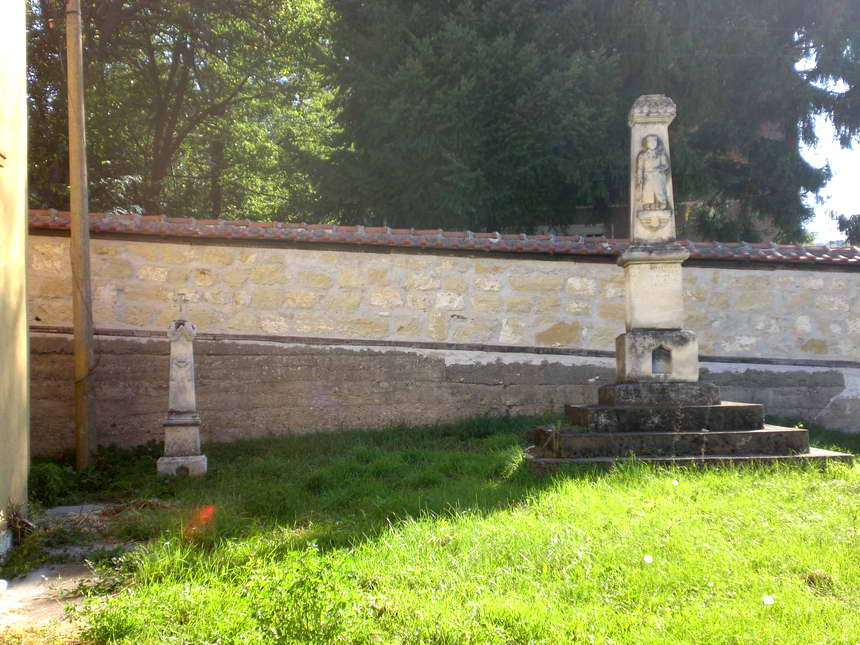 Паметникът на загиналите за Родината (вдясно) и учителския паметник (вляво) в двора на църковния храм на село Осиково, Поповско - 04.10.2007 год.